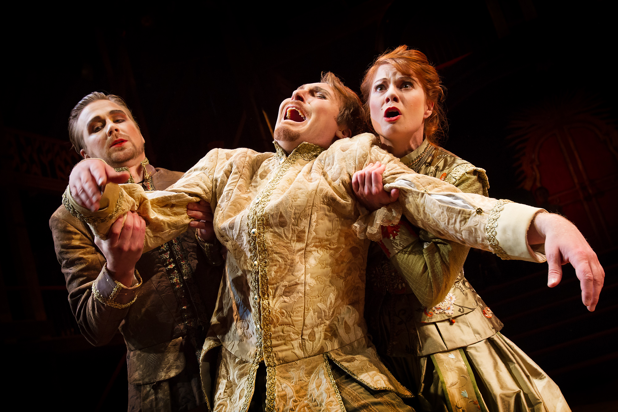 Misantropen